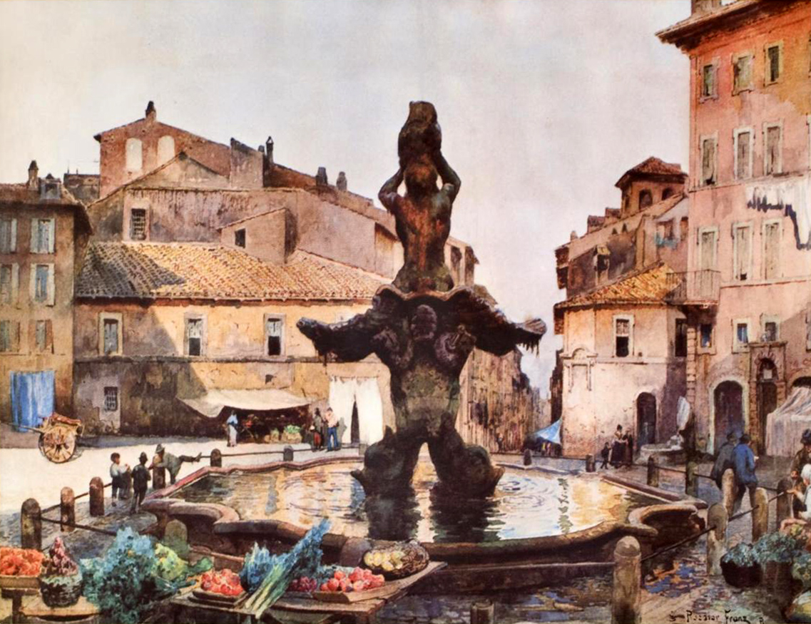 Piazza Barberini in Rome (rione Trevi).